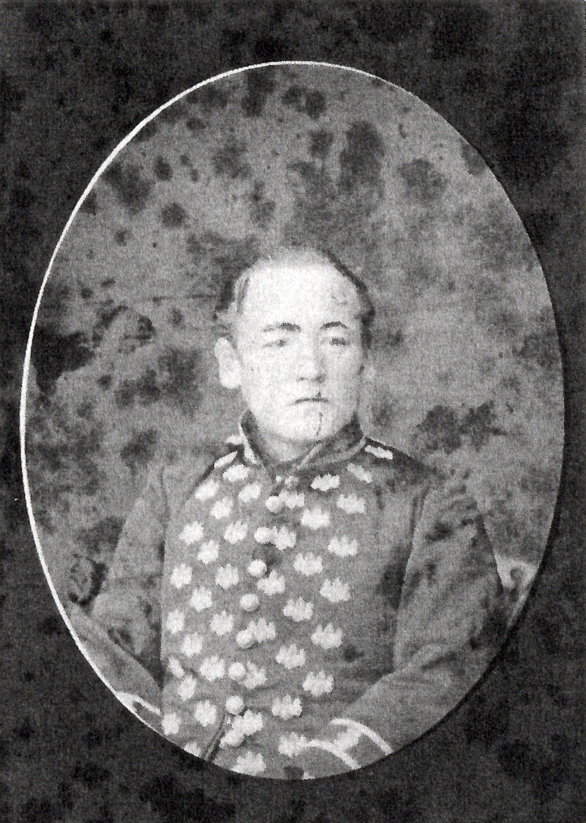 牧野貞直の肖像写真。